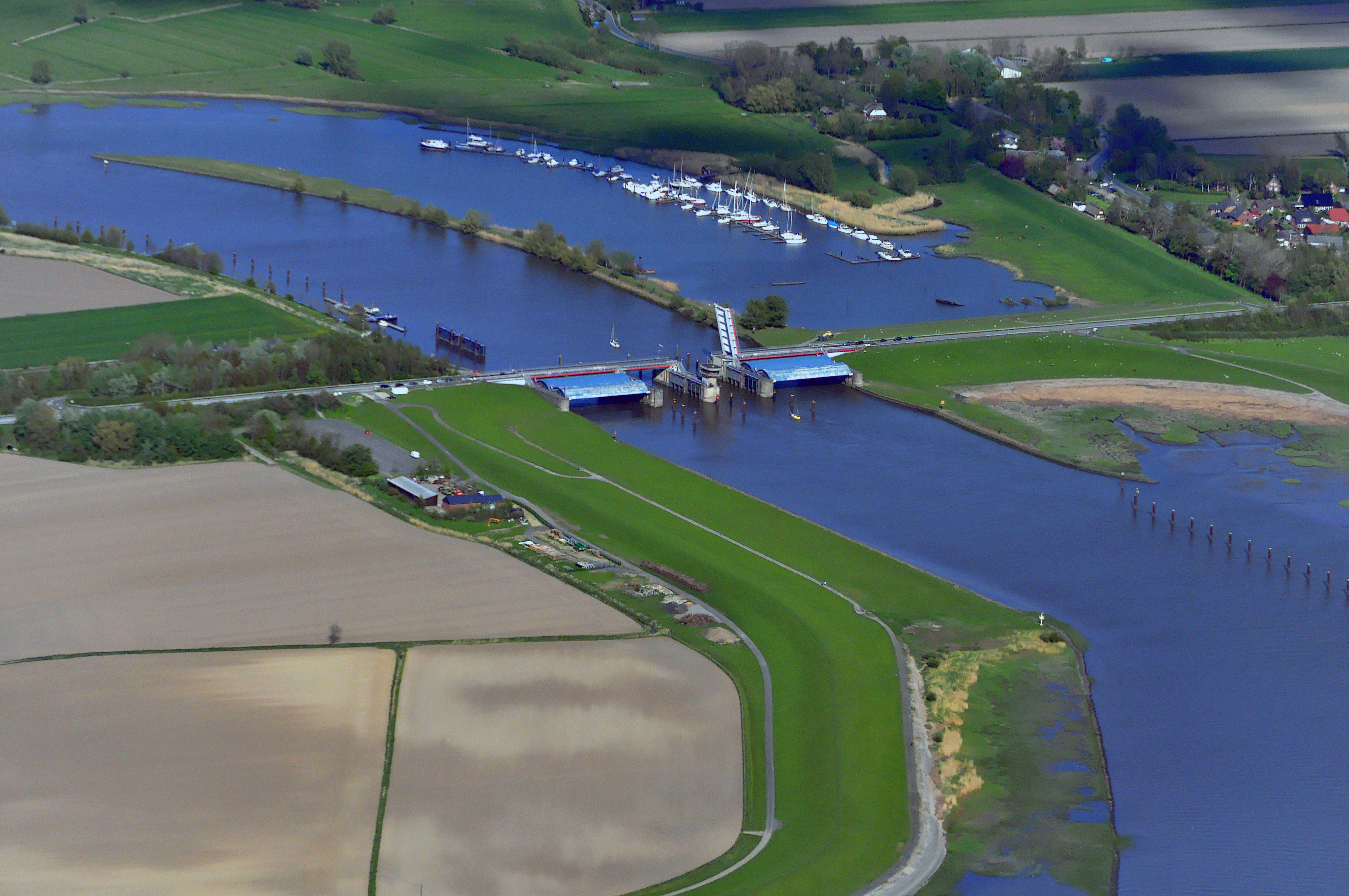 Luftbilder von der Nordseeküste 2012-05